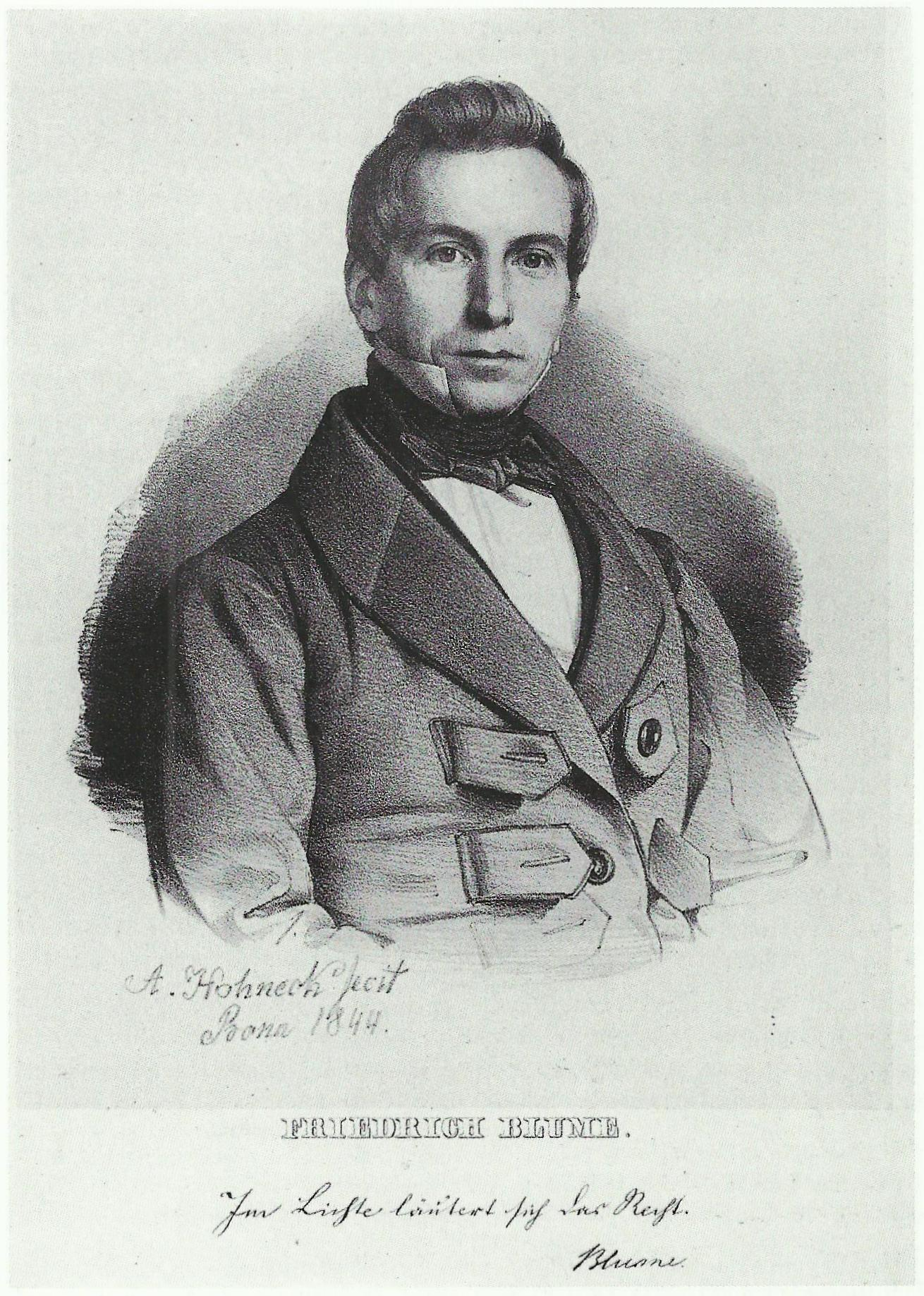 Friedrich Bluhme: Lithographie von Henry und Cohen nach einer Zeichnung von Adolf HohneckBlatt 20 x 31 cm, Bild 18,3 x 23,1 cm